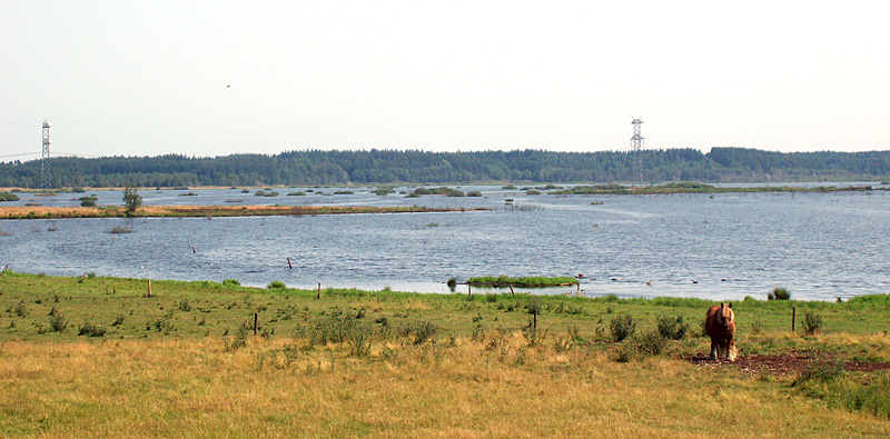 Bølling Sø er en genskabt sø mellem Engesvang, Funder og Kragelund sogne i Midtjylland. Den første 400 kV-forbindelse Kassø–Tjele krydser Bølling Sø.